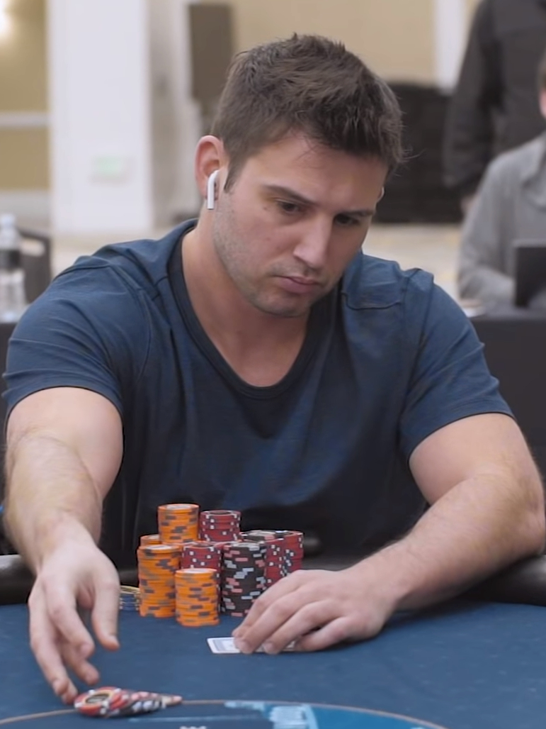 Darren Elias beim WPT LA Poker Classic